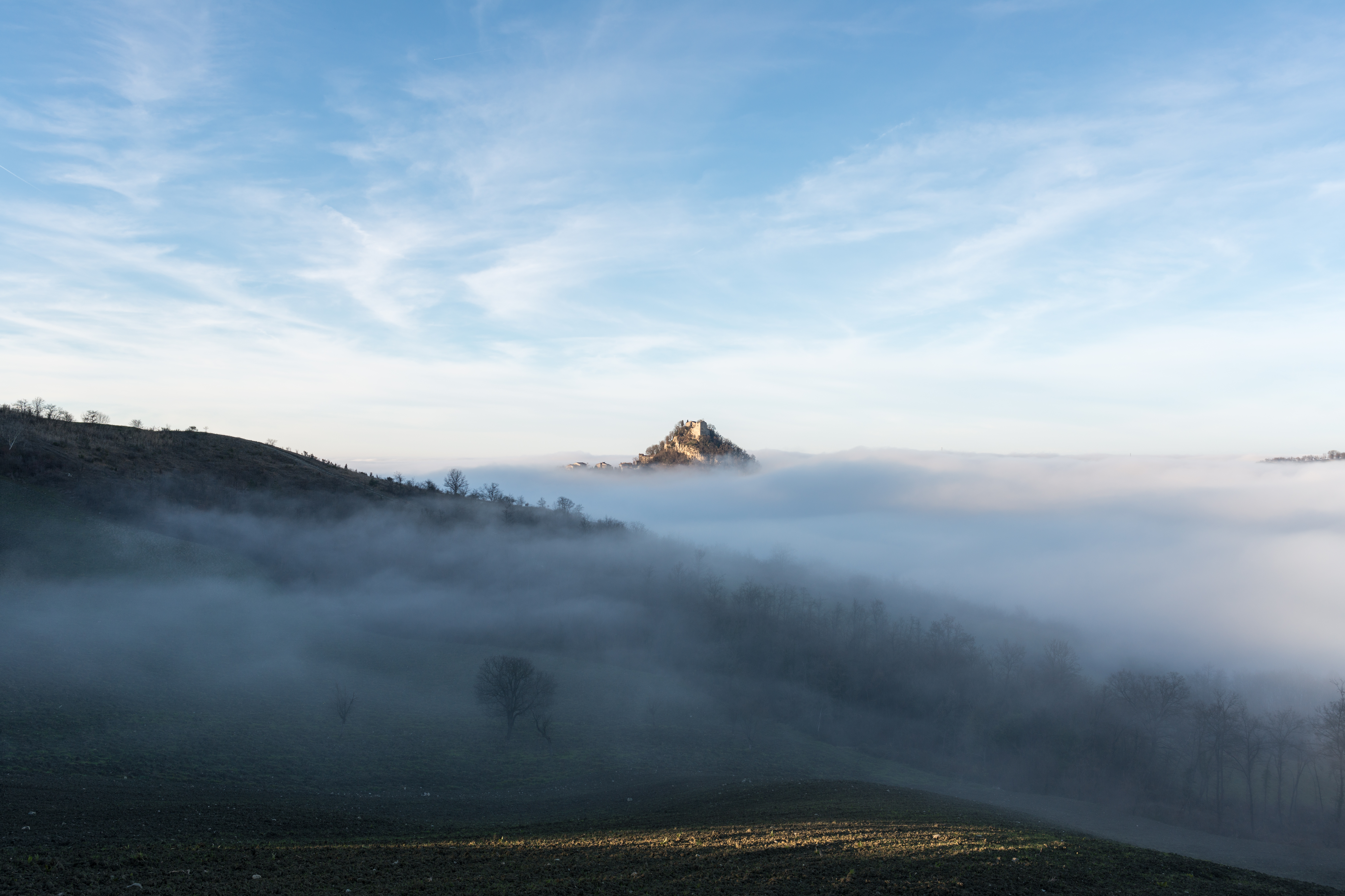 Castello di Canossa tra le nuvole - Canossa, Reggio Emilia, Italia